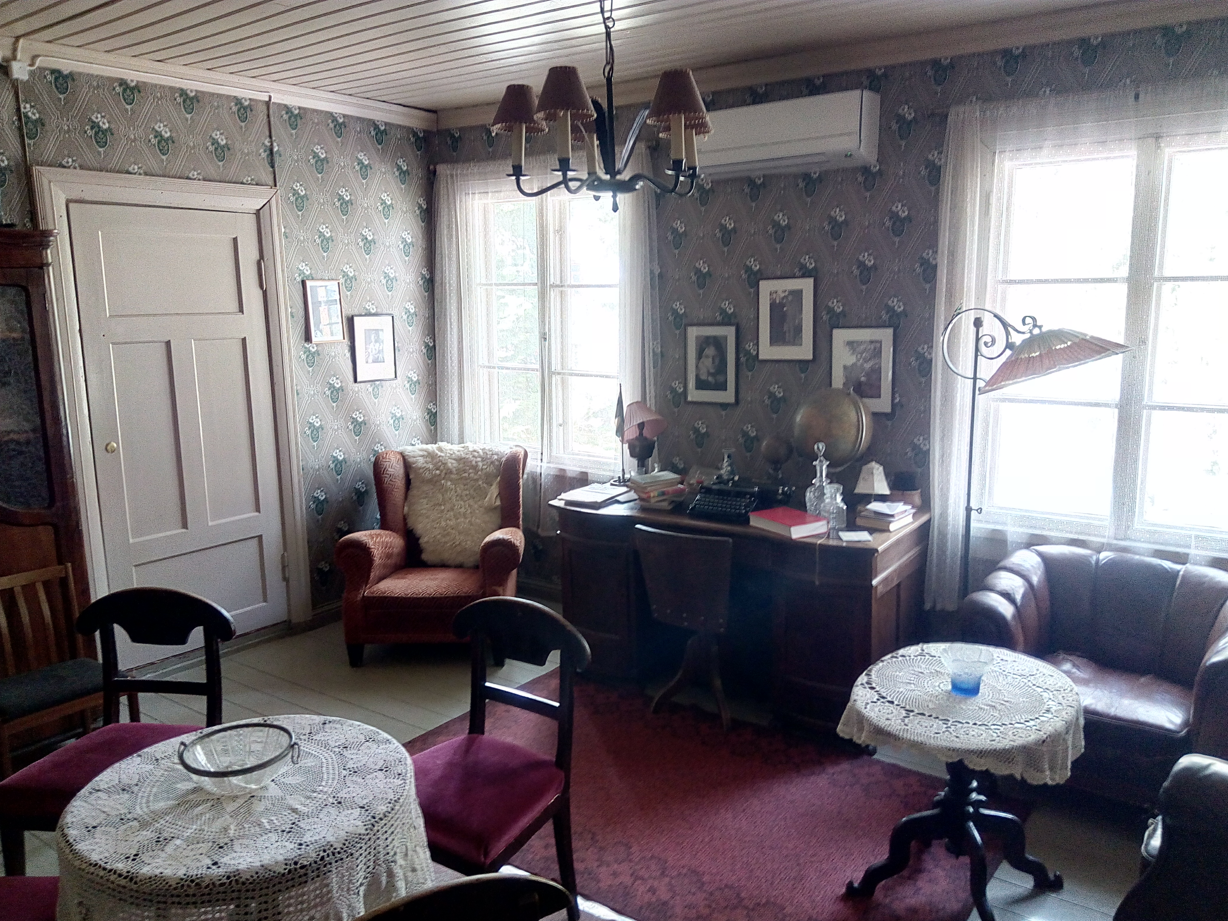 Kangasalan Lepokodin "Finnen huone"